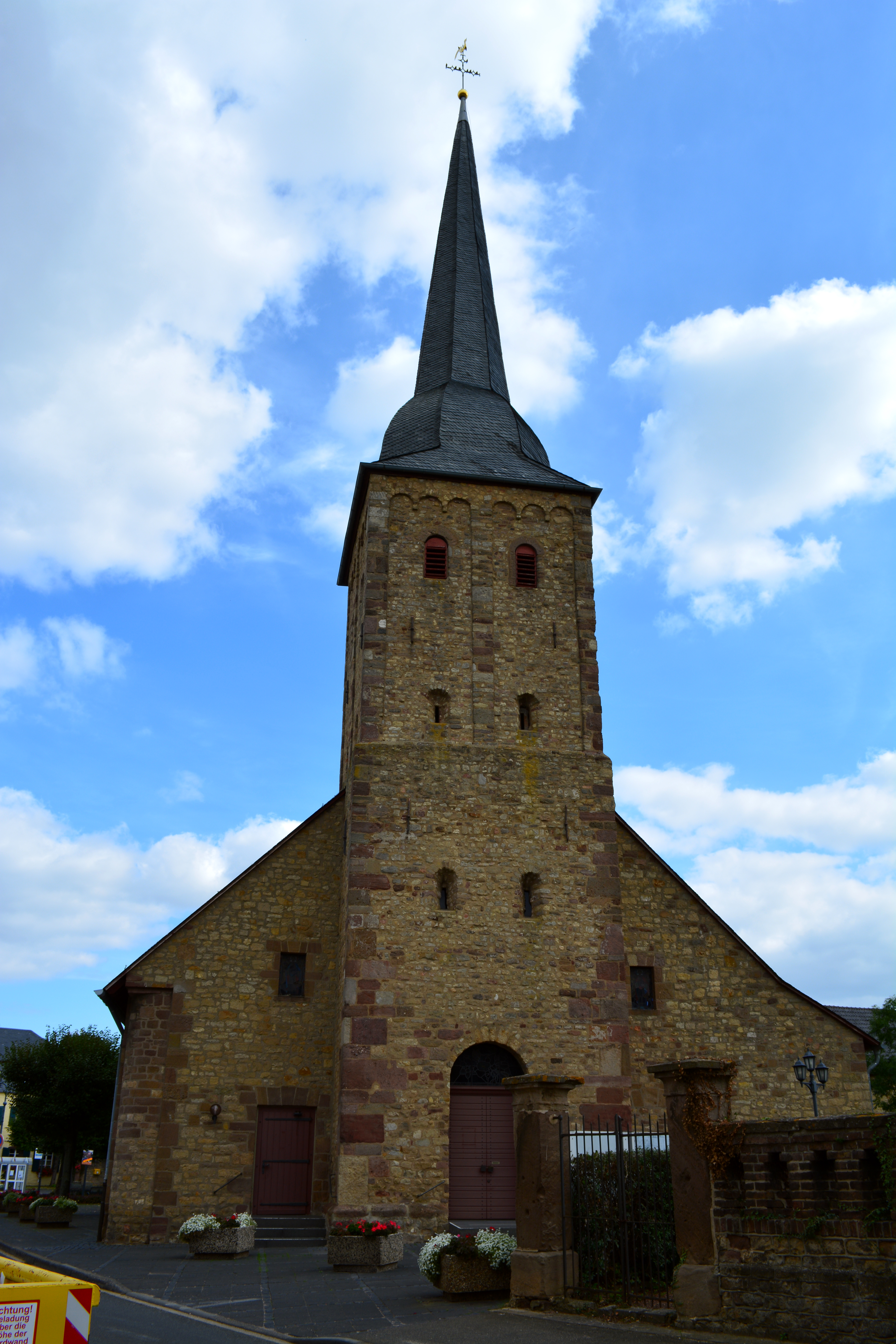 Kath. Pfarrkirche St. Agatha, Nideggen, Embken, Denkmal Nr. 69 This is a photograph of an architectural monument.